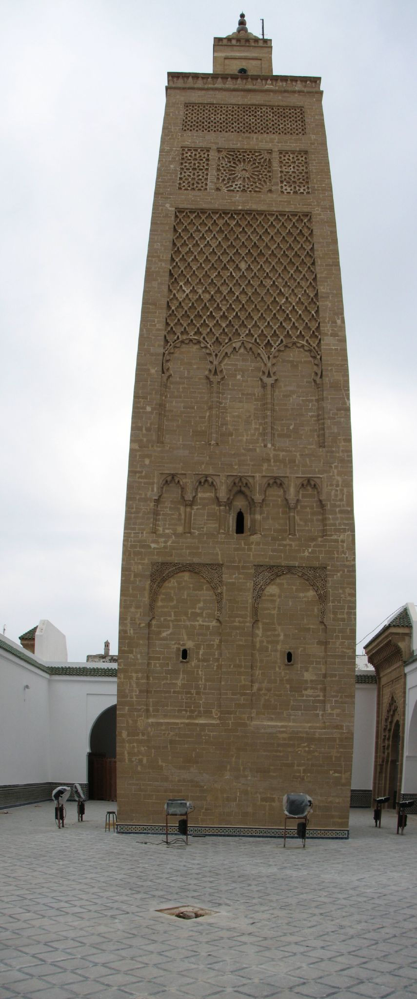 La mosquée de Salé a été construite par les Banou Ifren entre 1028 et 1029.